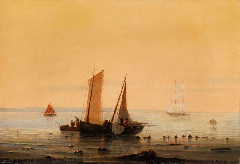 ABENDLICHER BLICK IN EINE MEERESBUCHT Öl auf Leinwand, 22 x 32 cm. Rechts unten signiert und ortsbezeichnet „Antwerpen“, datiert „1870“ („1879“?).